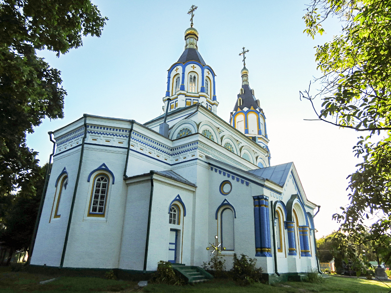 Иллинская церковь в Чернобыле